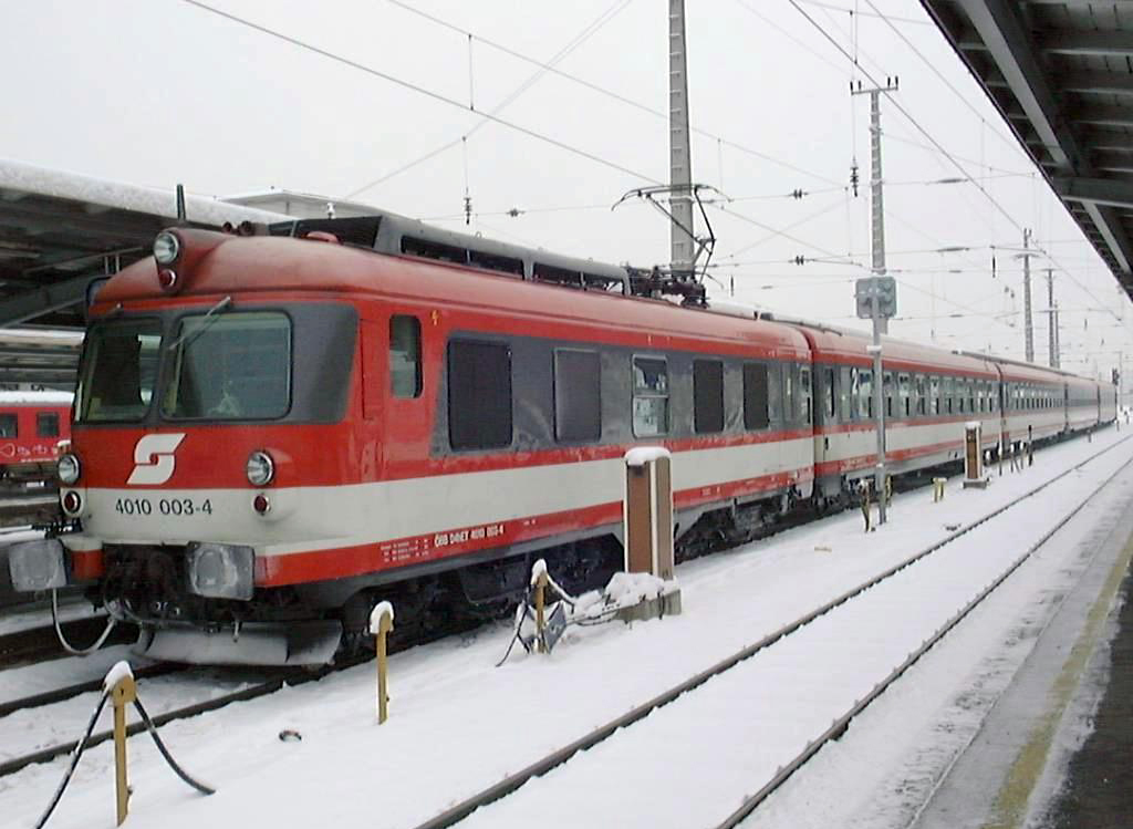 de: ÖBB 4010 003-4 in Graz Hbf